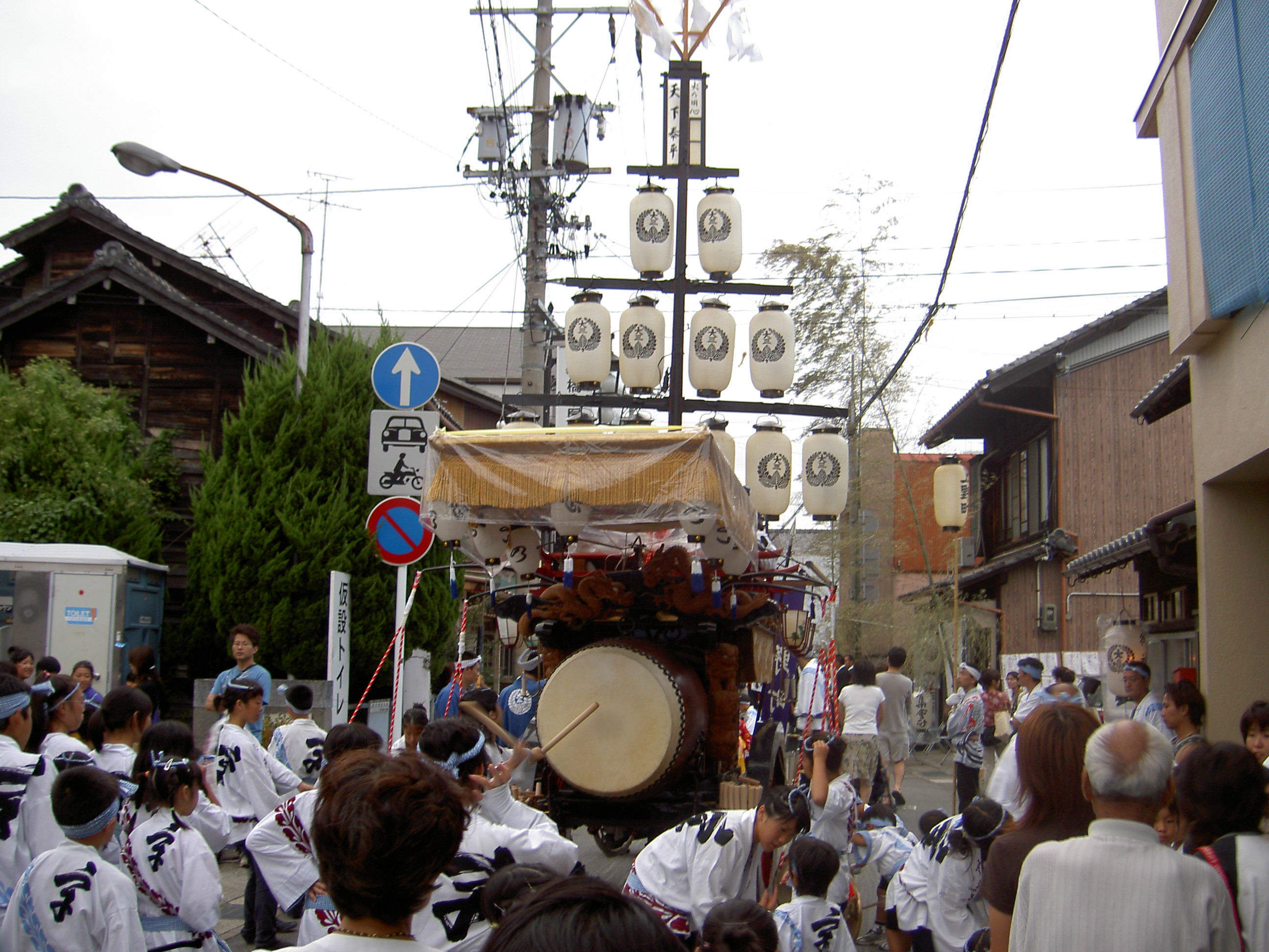 三重県桑名市に伝わる石取祭